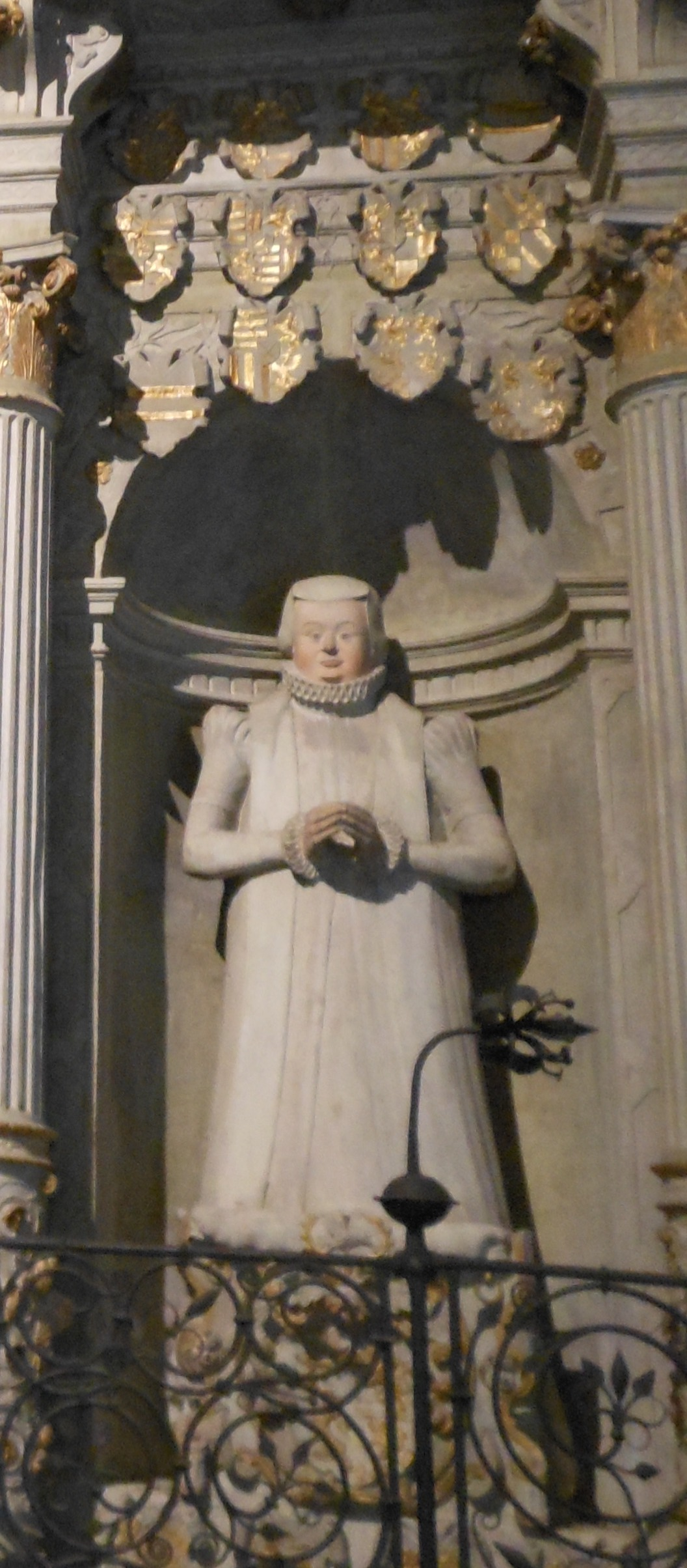 Stadthagen, St.-Martini-Kirche, Epitaph, Figur der Elisabeth Ursula von Braunschweig-Lüneburg